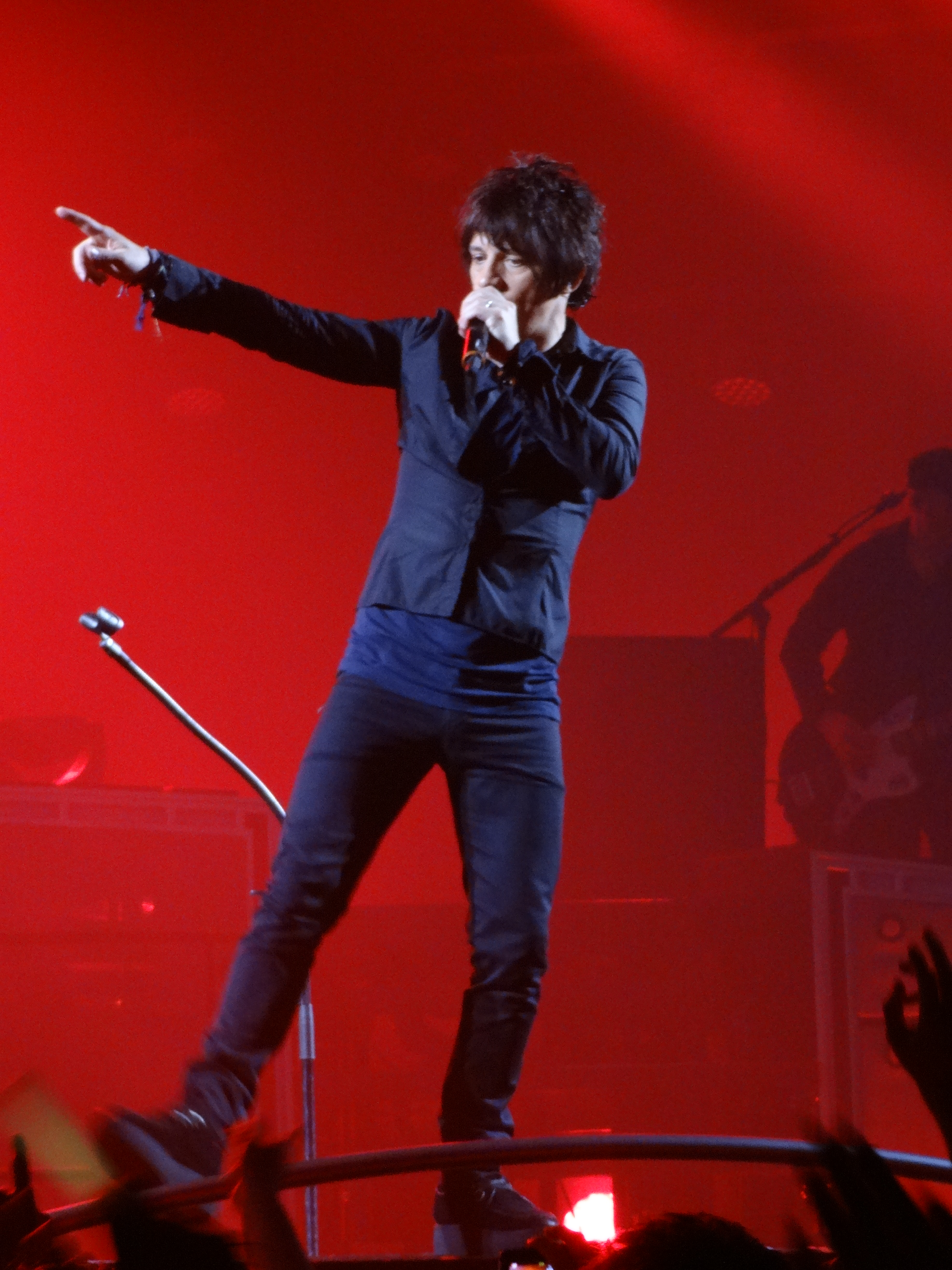 Nicola Sirkis lors du concert d'Indochine à Brest le 23 mars 2013